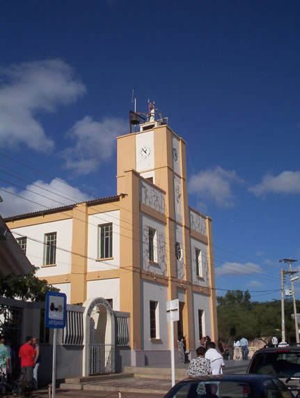 Iglesia de Uribia, La Guajira - Colombia.